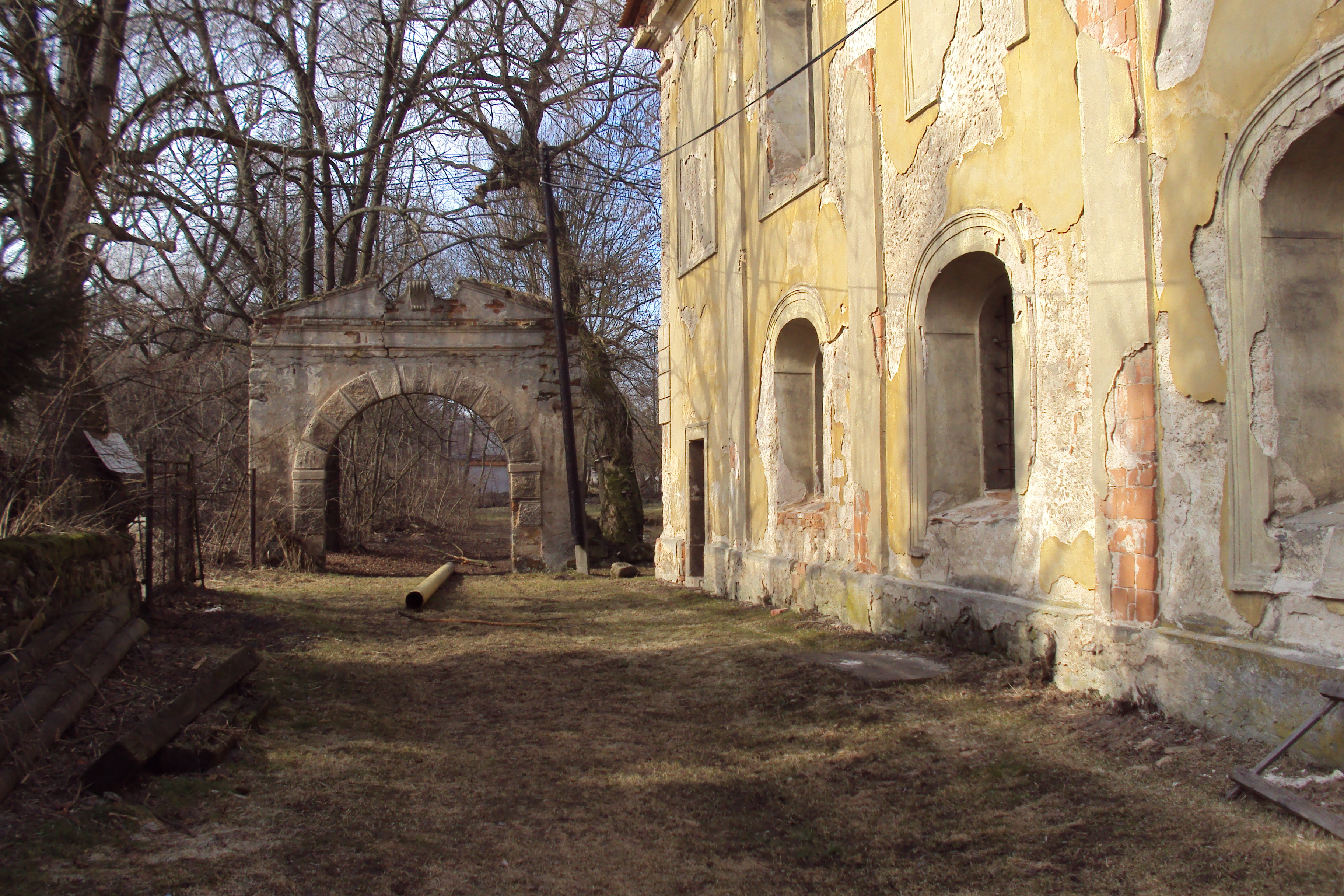 Zámek Stvolínky na Českolipsku, detail